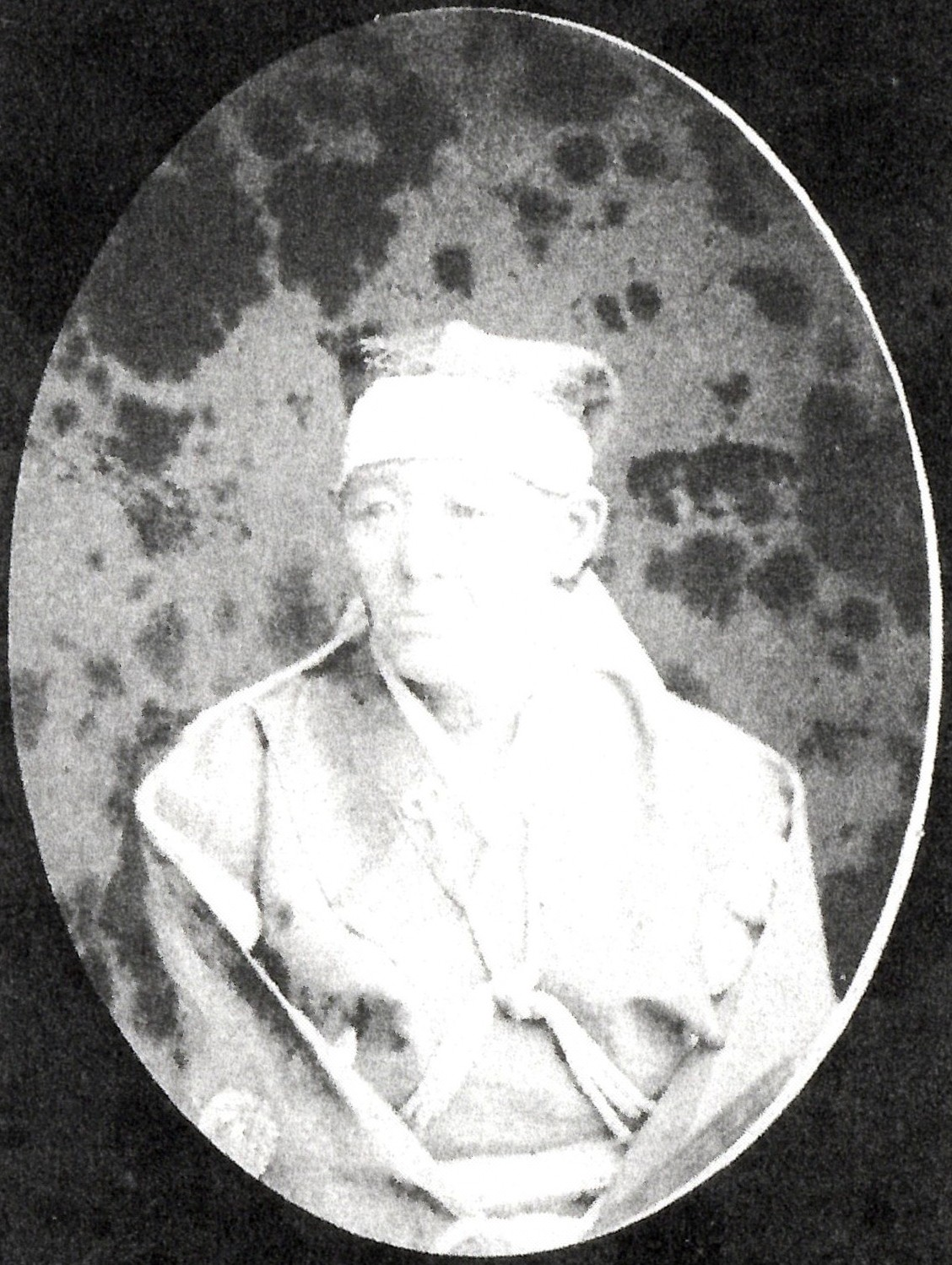 松平頼位の肖像写真。